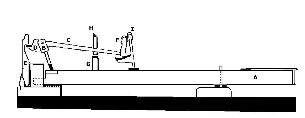 Prellzungenmechanik